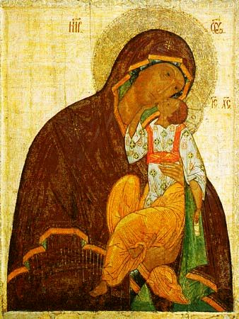 Икона Божией Матери Яхромская